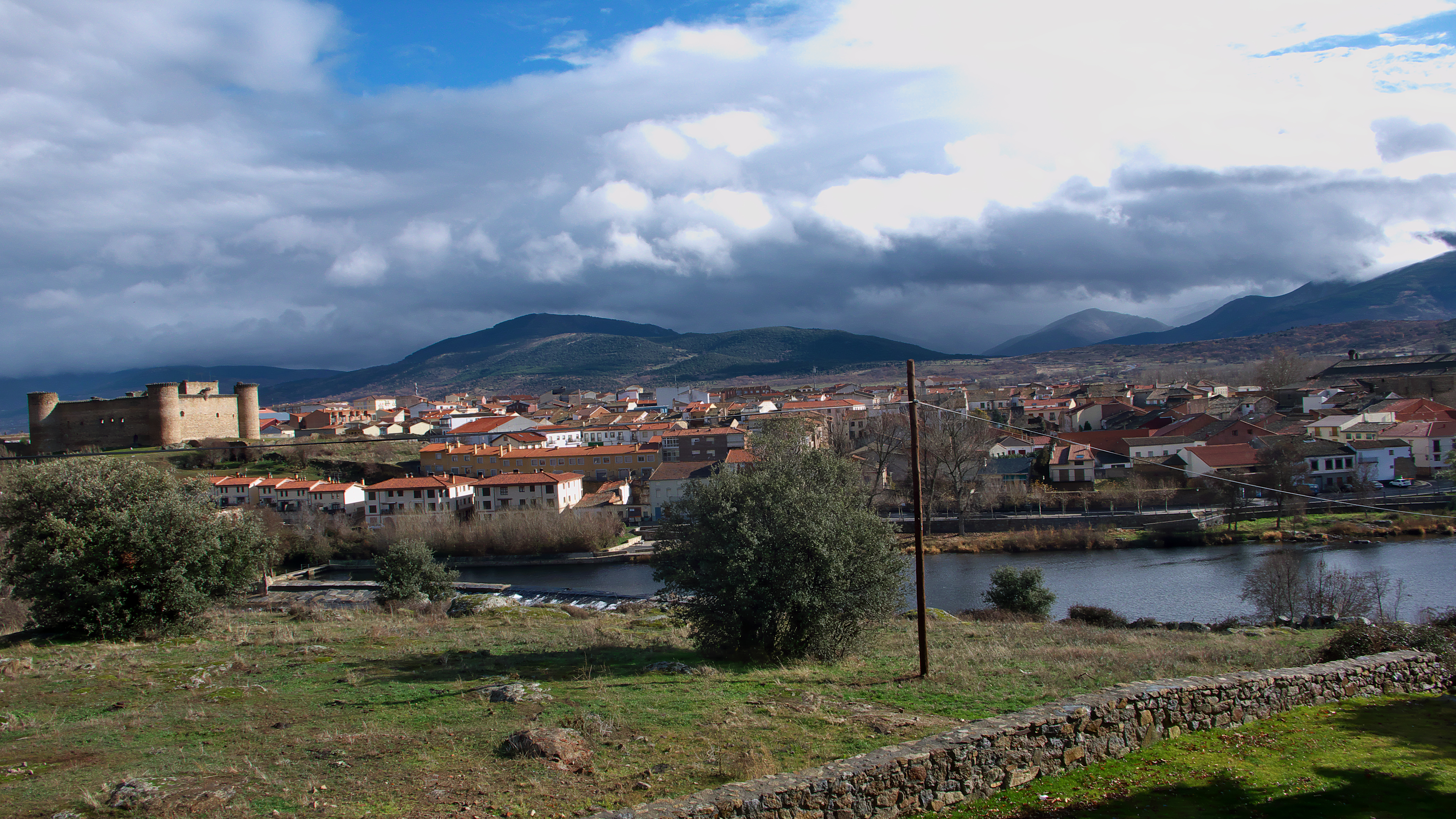 Panorámica de la villa y su castillo